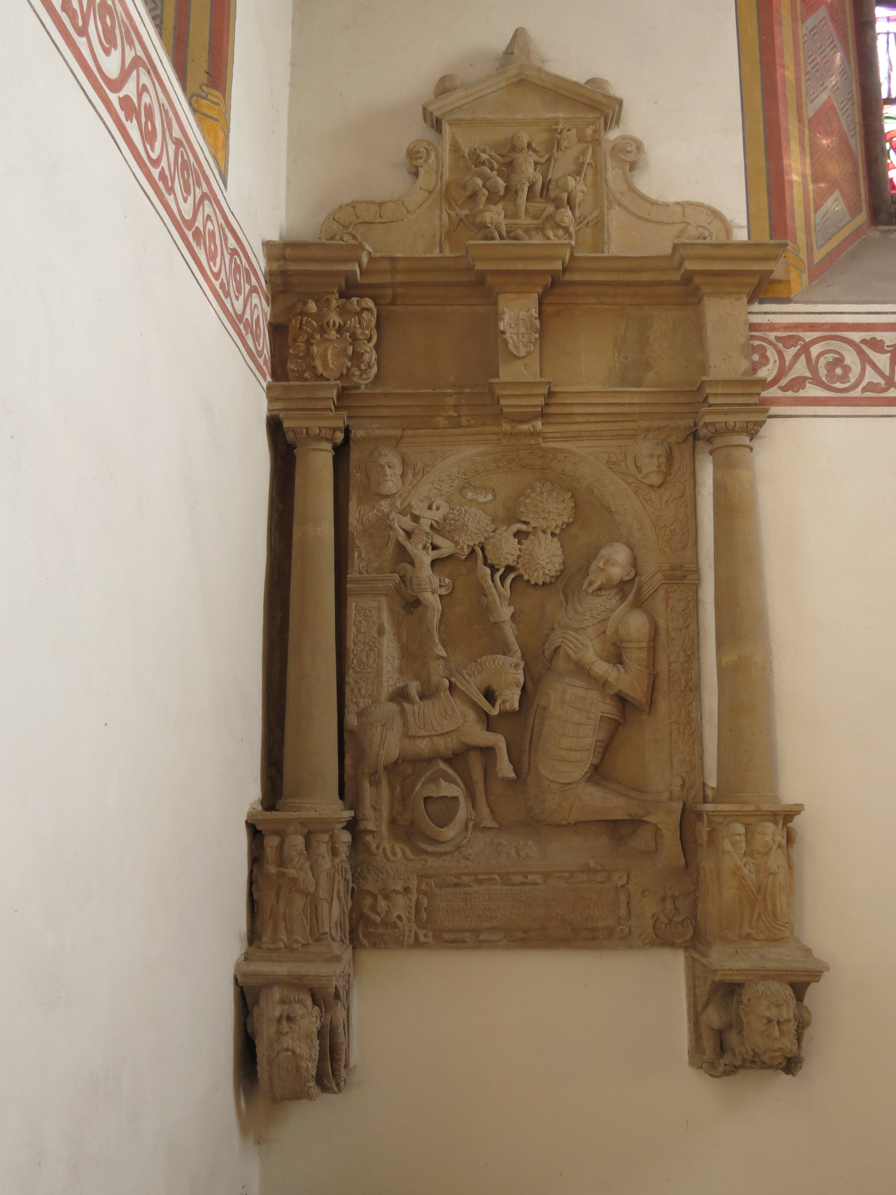 Epitaph des Liborius von Bredow († 1577), Komtur der Johanniterkommende Süpplingenburg, St. Johannis-Kirche, Süpplingenburg, Landkreis Helmstedt, Niedersachsen